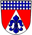 znak obce Haňovice